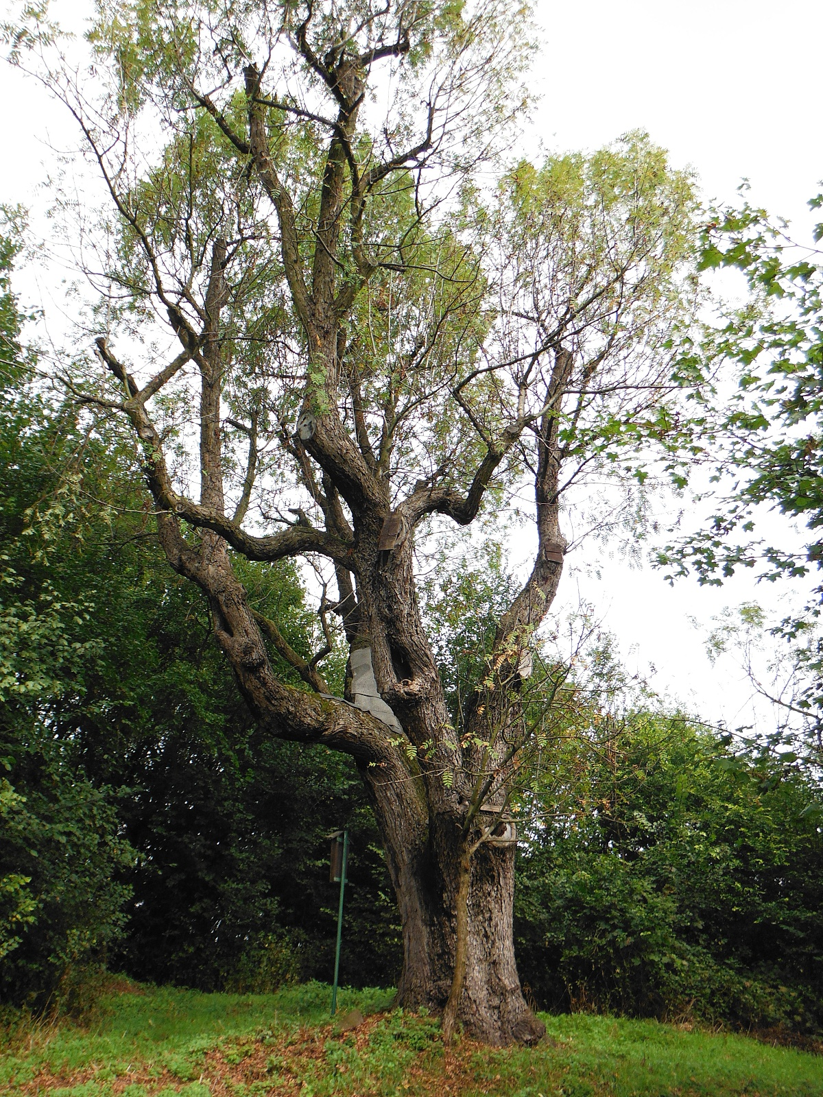 Památný strom oskeruše u obce Košťálov, okr. Litoměřice, září 2014